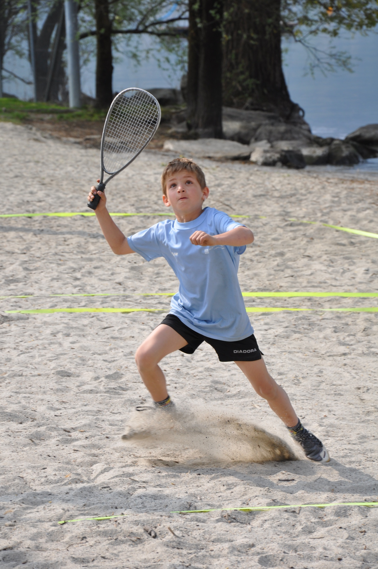 Foto Michael jr. in Tenero